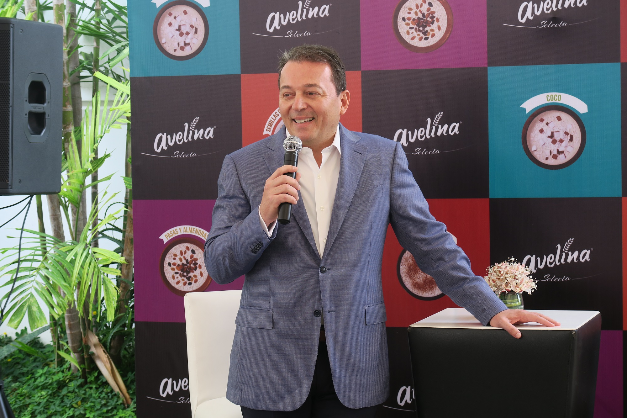 Mauro Libi Crestani participó en el lanzamiento de Avelina Selecta, en Caracas, Venezuela.